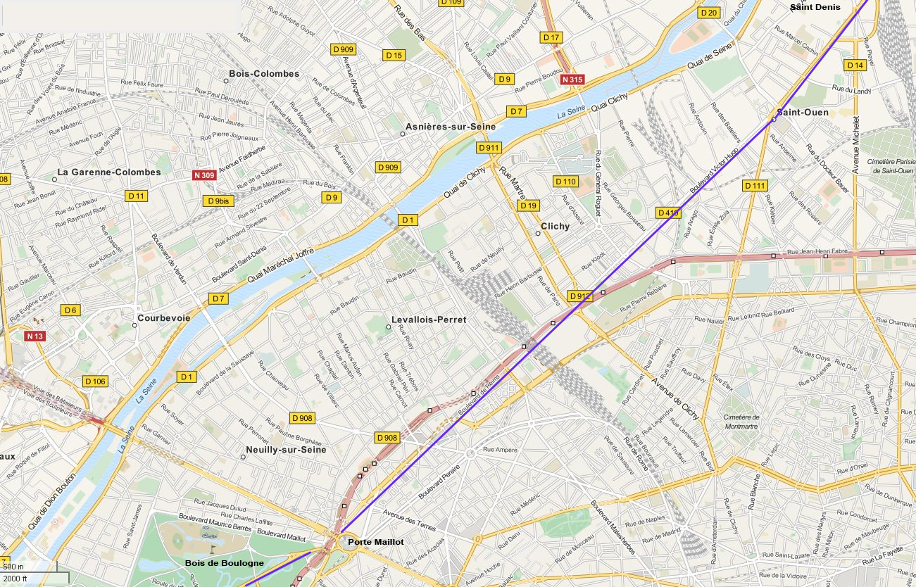 Cartes Open Street Map modifiée par moi pour indiquer le tracé de la Route de la révollte aujourd'huide la porte Maillot à Paris jusqu'à Saint-Denis dans la banlieue Nord de Paris